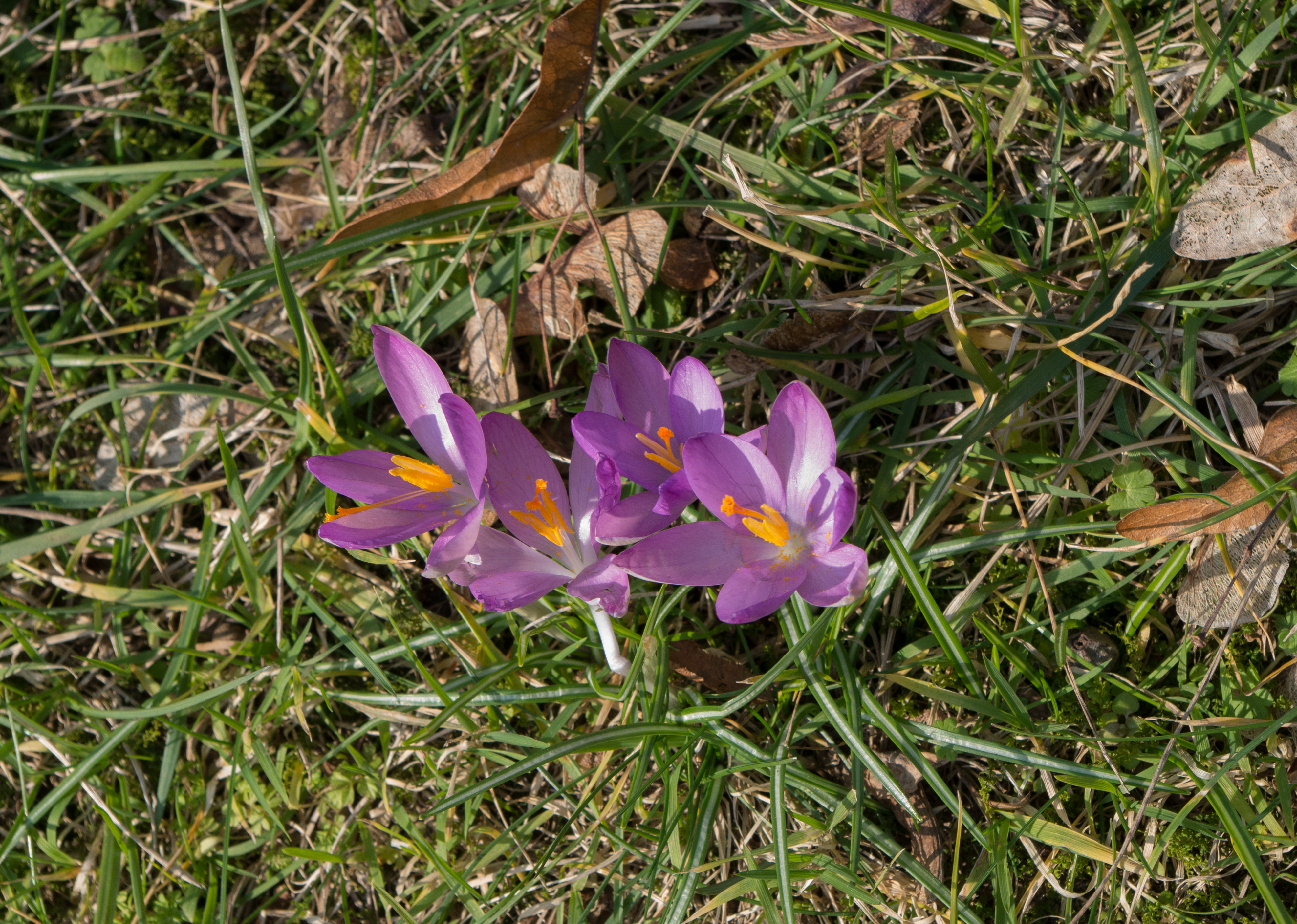 Crocus du Jardin des Plantes mi-février - Crocus corsicus